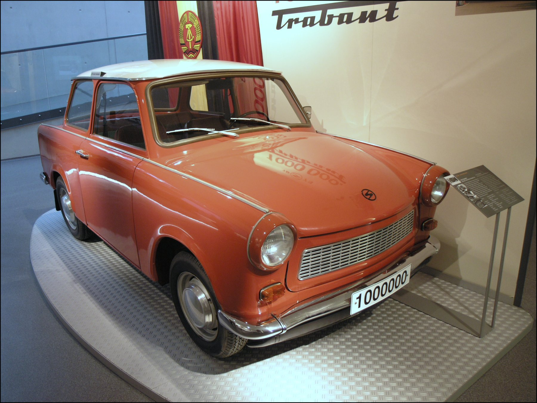 P 601 Trabant (1973 / 1964-1990)